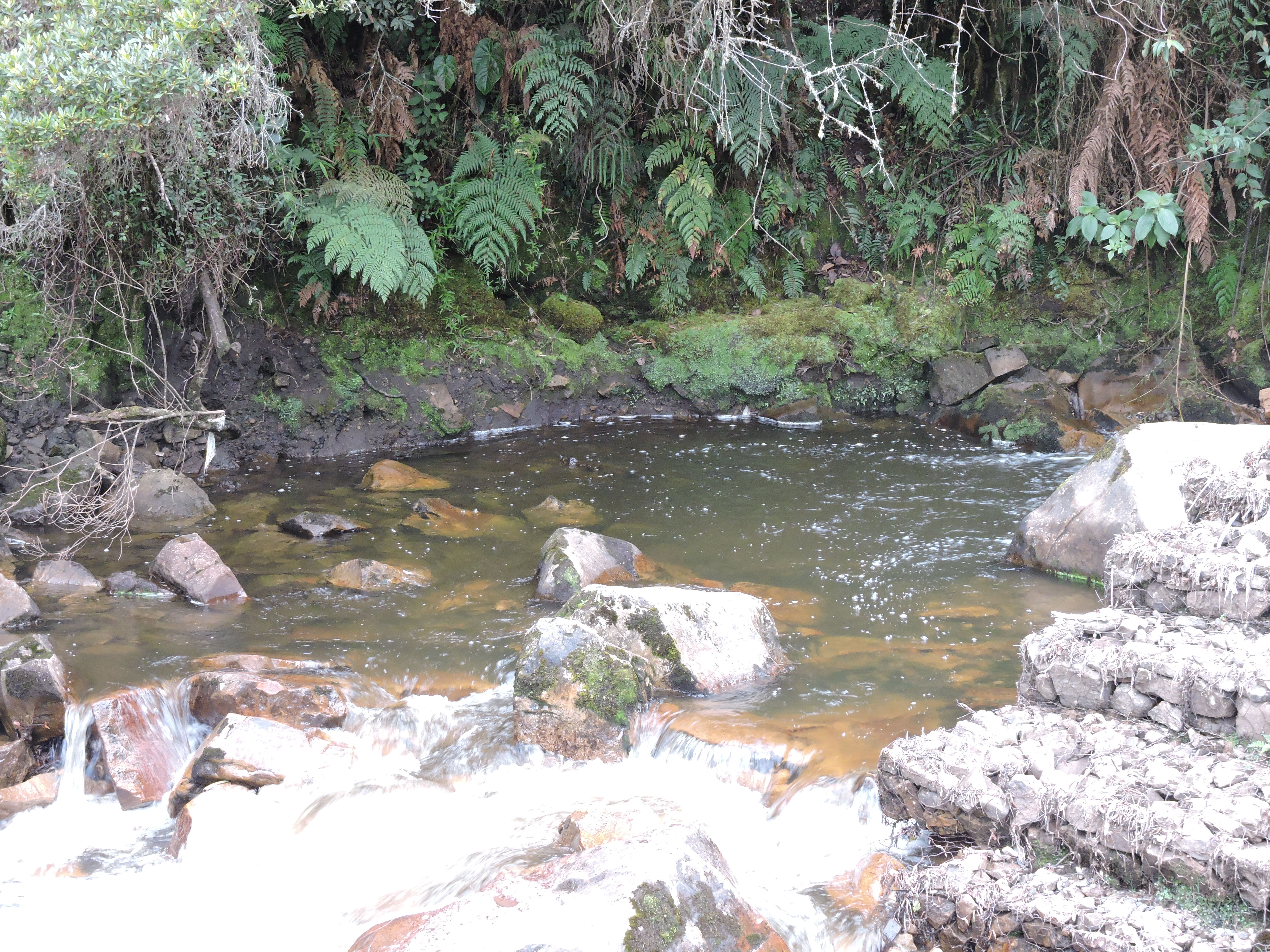 Manantial cerca al municipio de Fomeque - Cundinamarca Esta fotografía fue tomada en el municipio colombiano con código 25279.